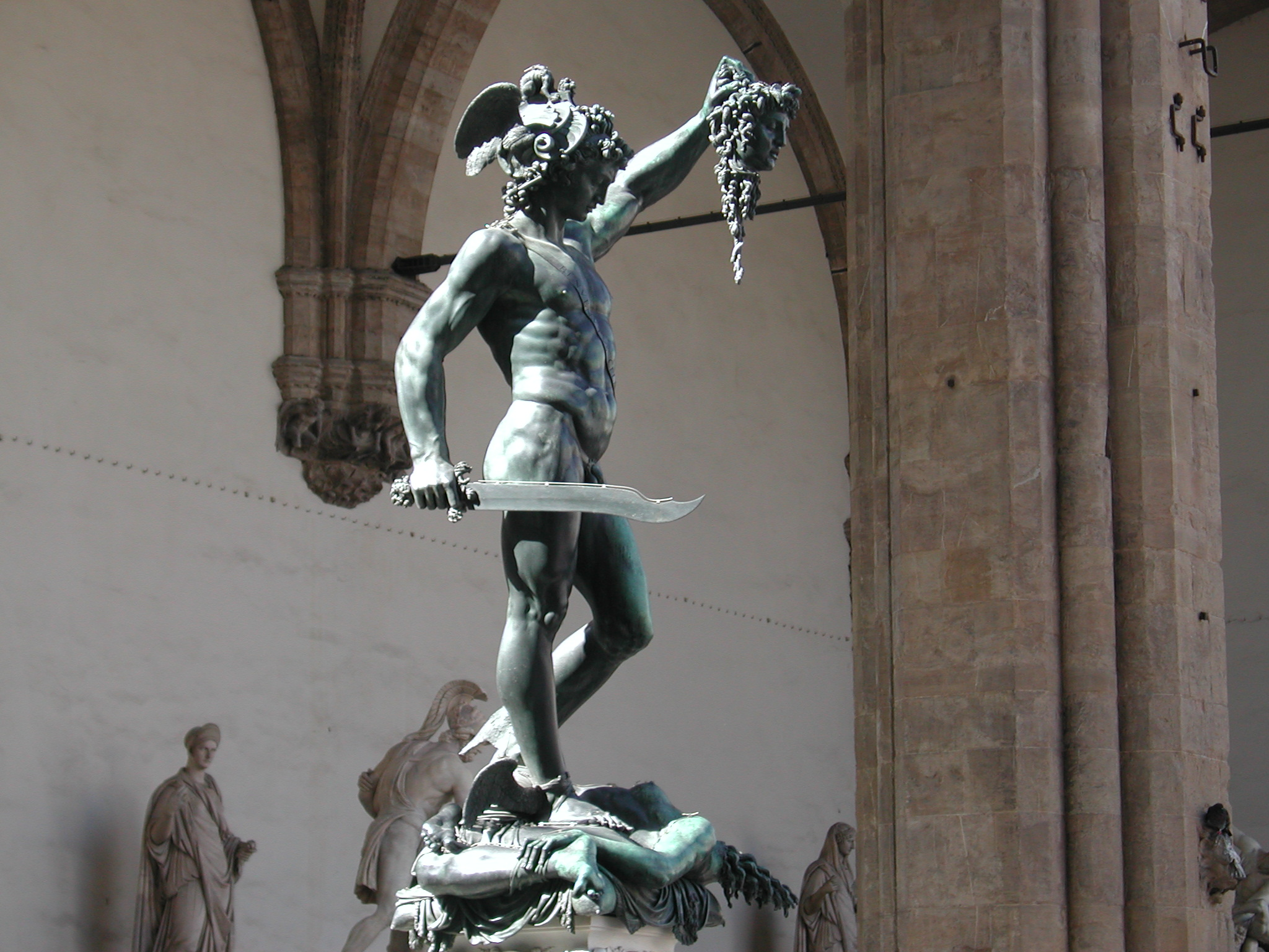 Firenze, Loggia dei Lanzi, il Perseo di Benvenuto Cellini.